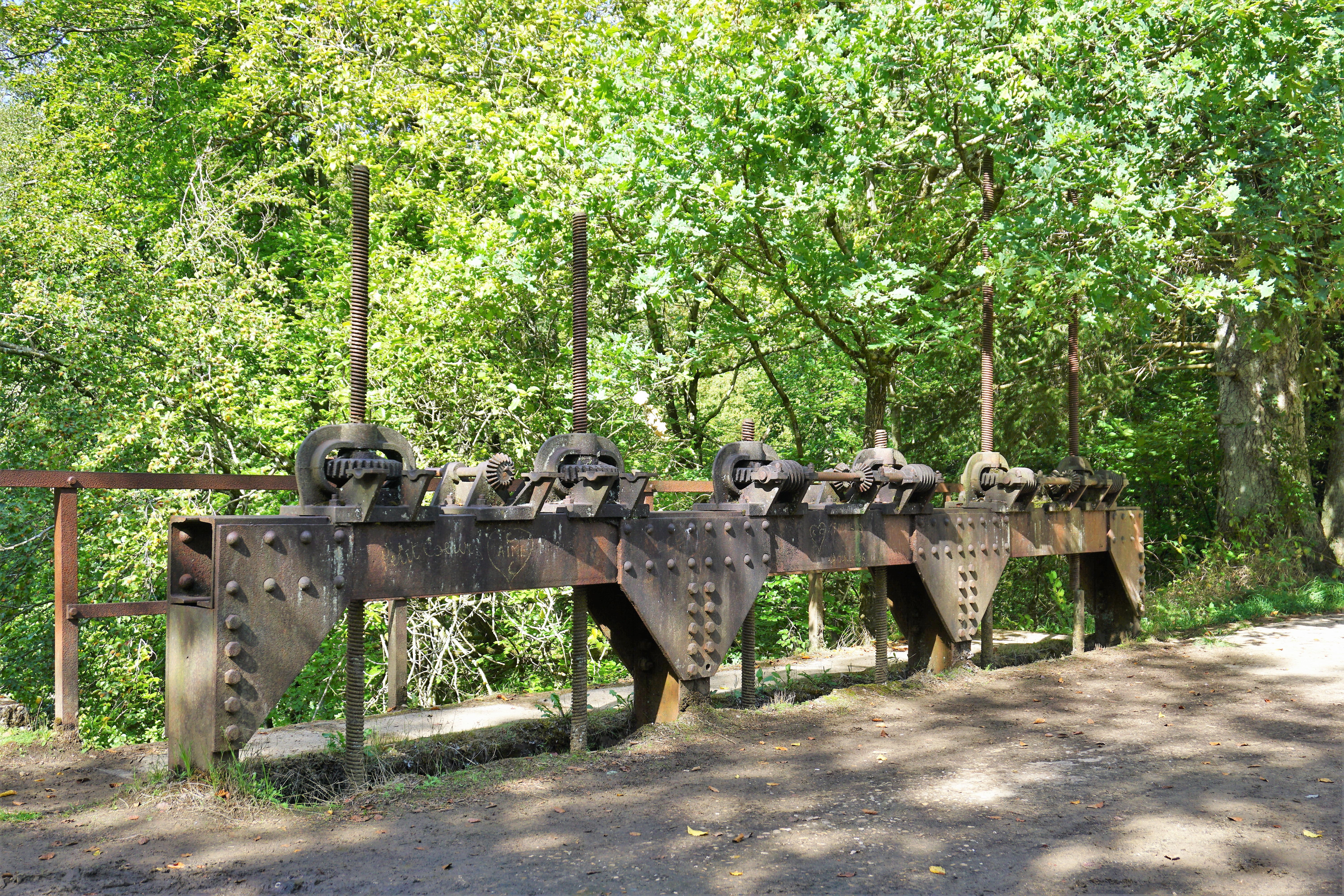 Autelbas. Restes du barrage de rétention dont l'eau servait autrefois de refroidisseur à l'usine sidérurgique de Steinfort.